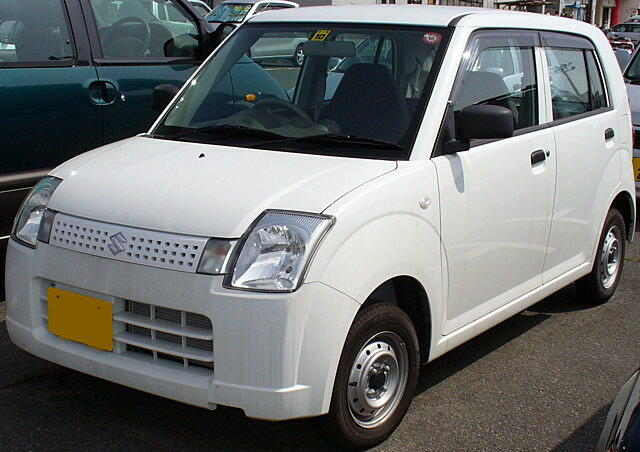 6代目スズキ・アルト（バン）